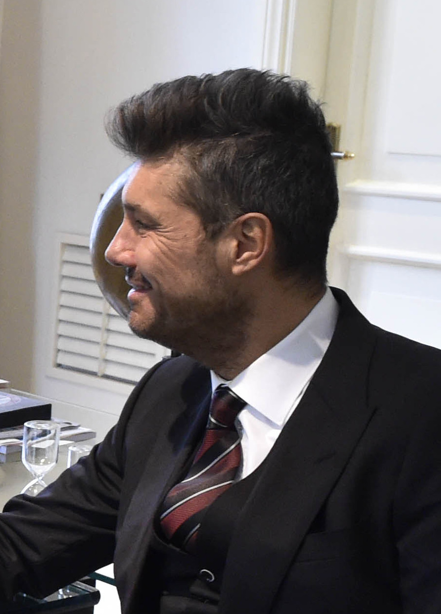 El presidente Mauricio Macri recibió en la residencia de Olivos al conductor de TV y vicepresidente primero del club San Lorenzo de Almagro, Marcelo Tinelli.